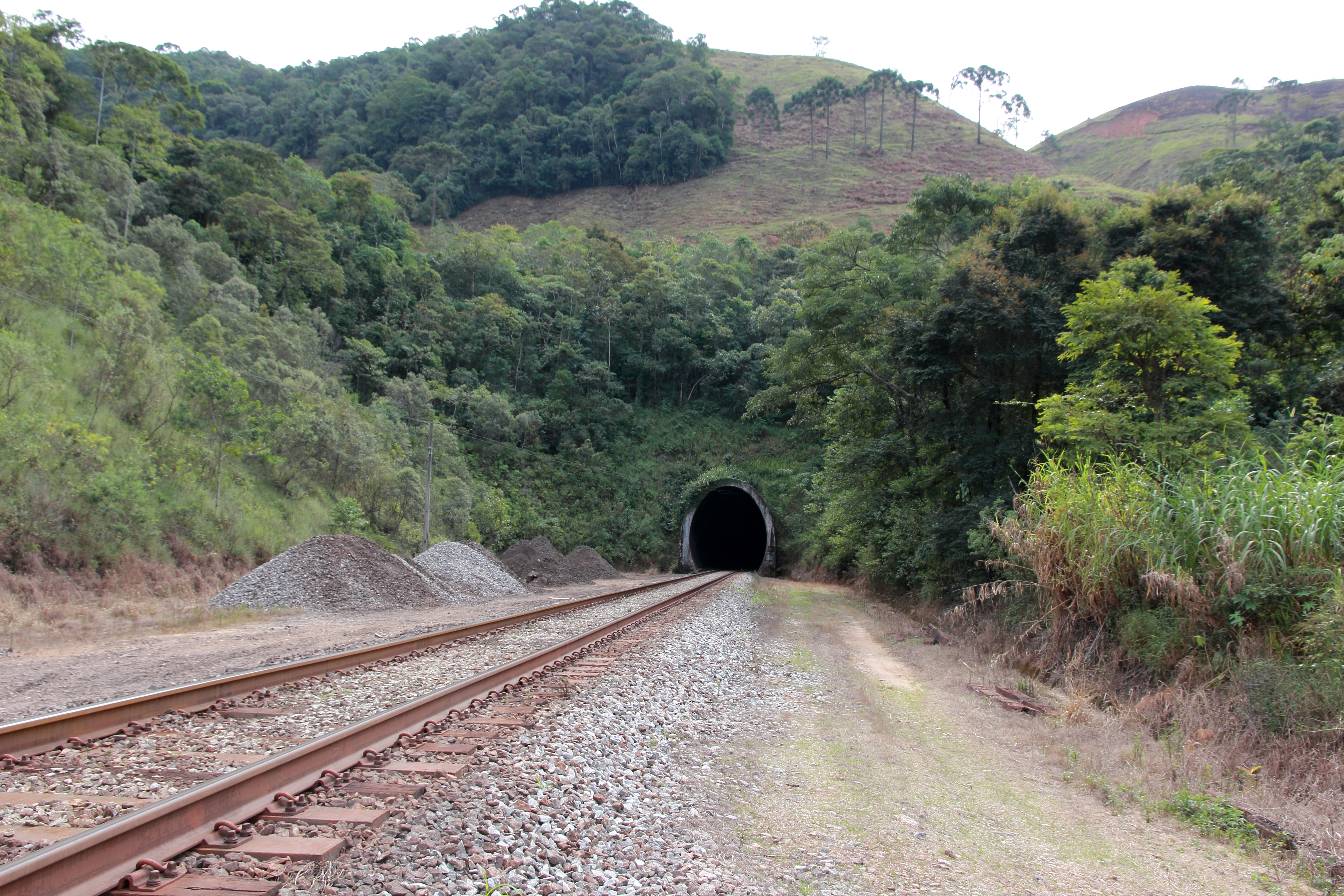 Túnel 45 - Km. 87 - Extensão 614 metros.